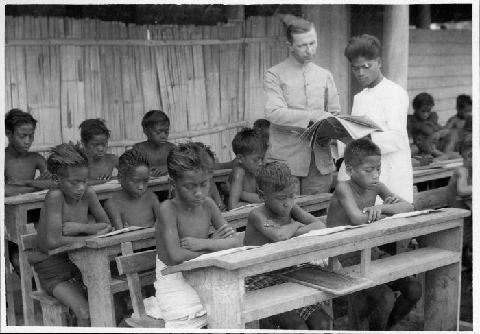 Negatief. Schoolopziener F. van Dijk inspecteert een afgelegen kampongschool op Sumba.